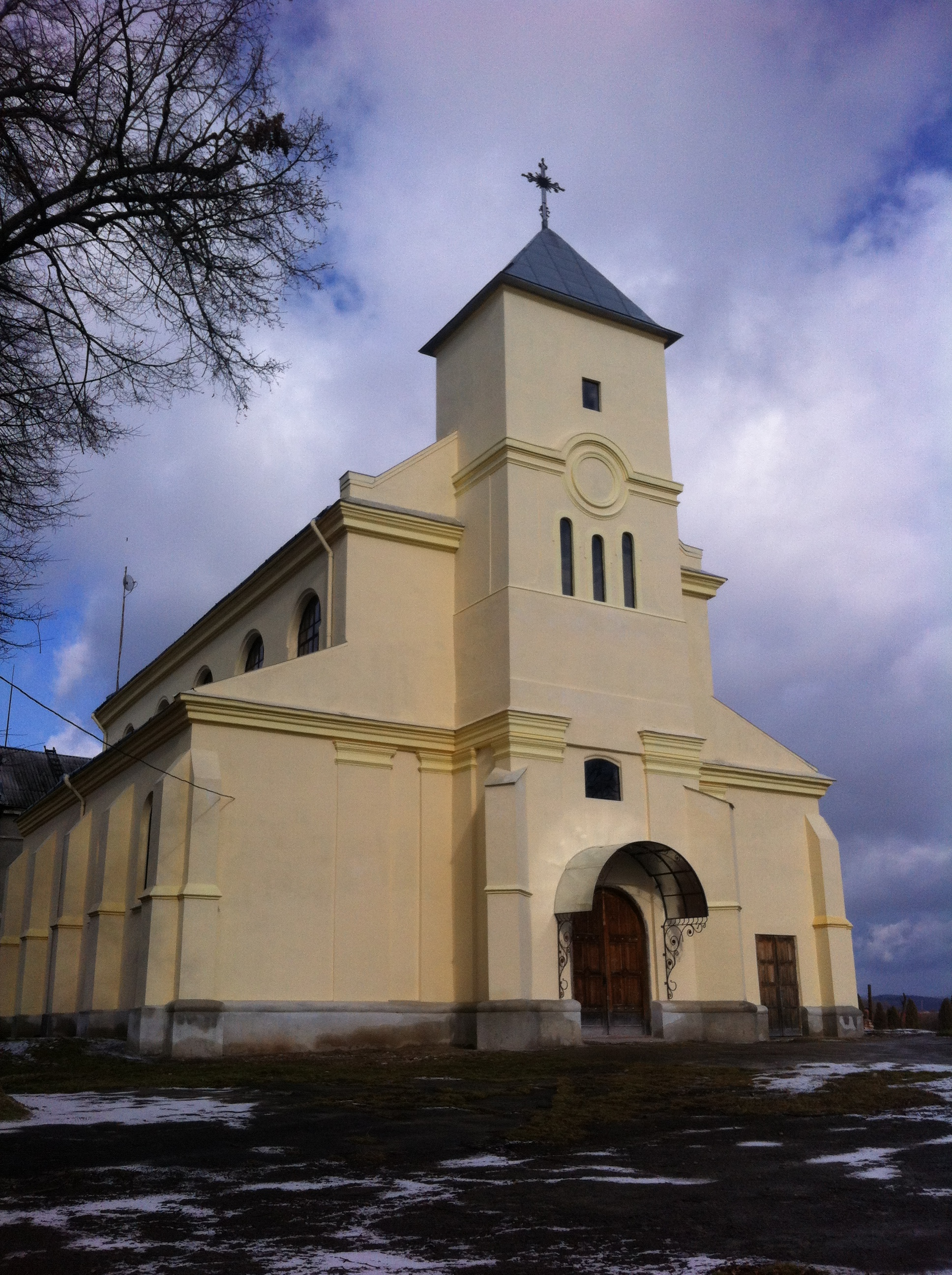 Домініканський костел в Єзуполі